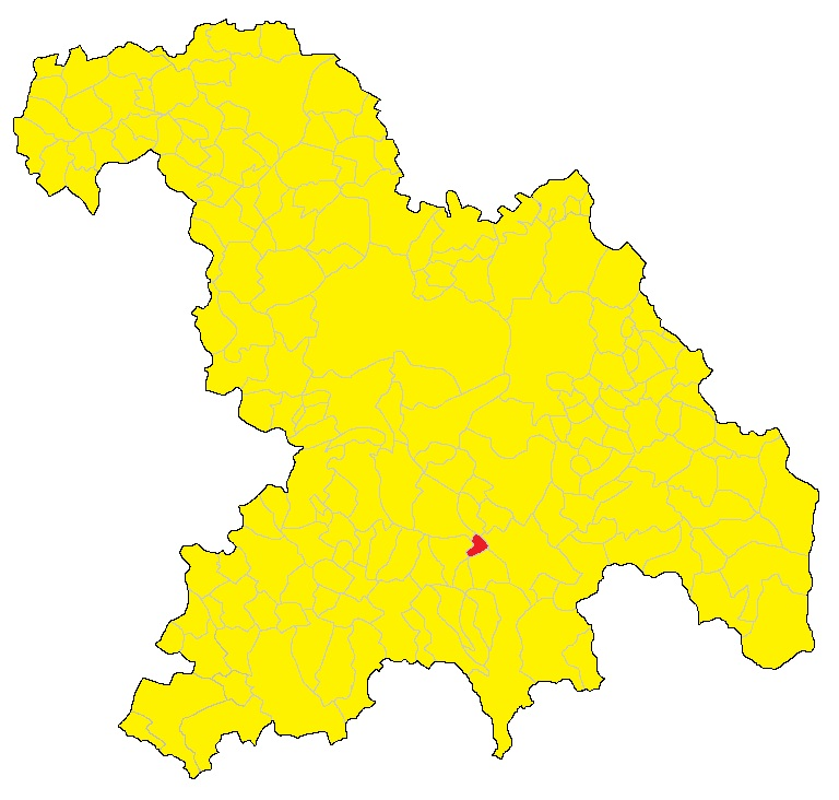 Mappa del comune di San Cristoforo (AL)